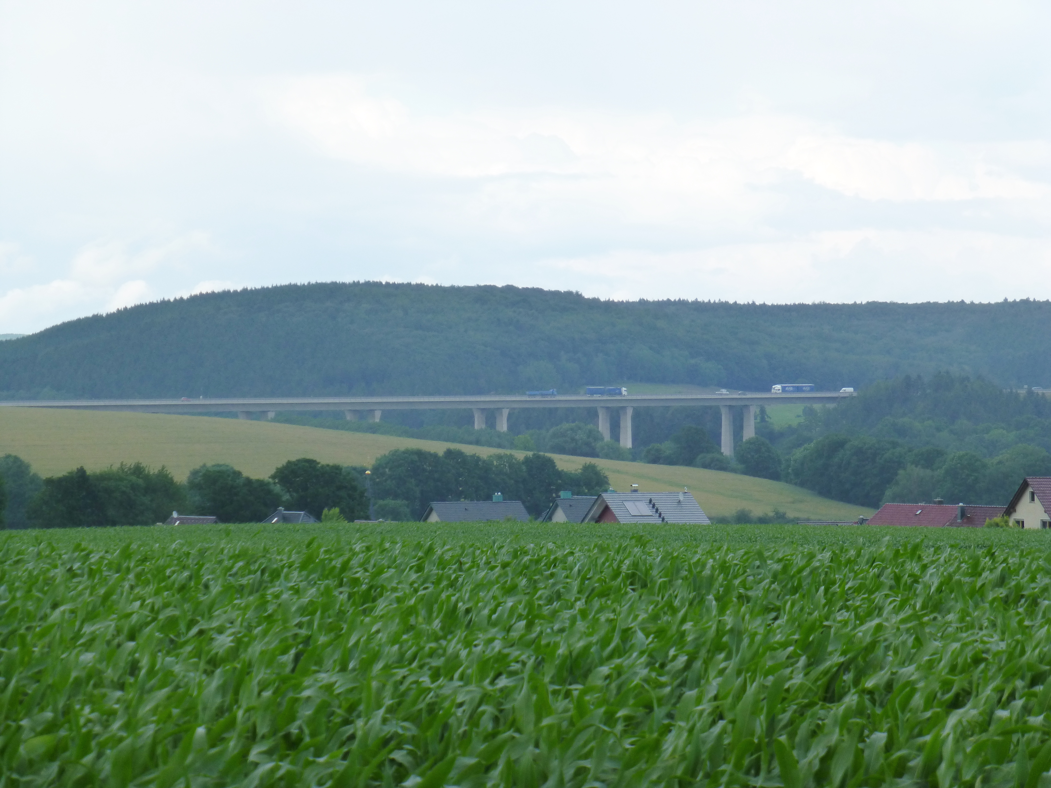 Etzelsbachtalbrücke von Süden